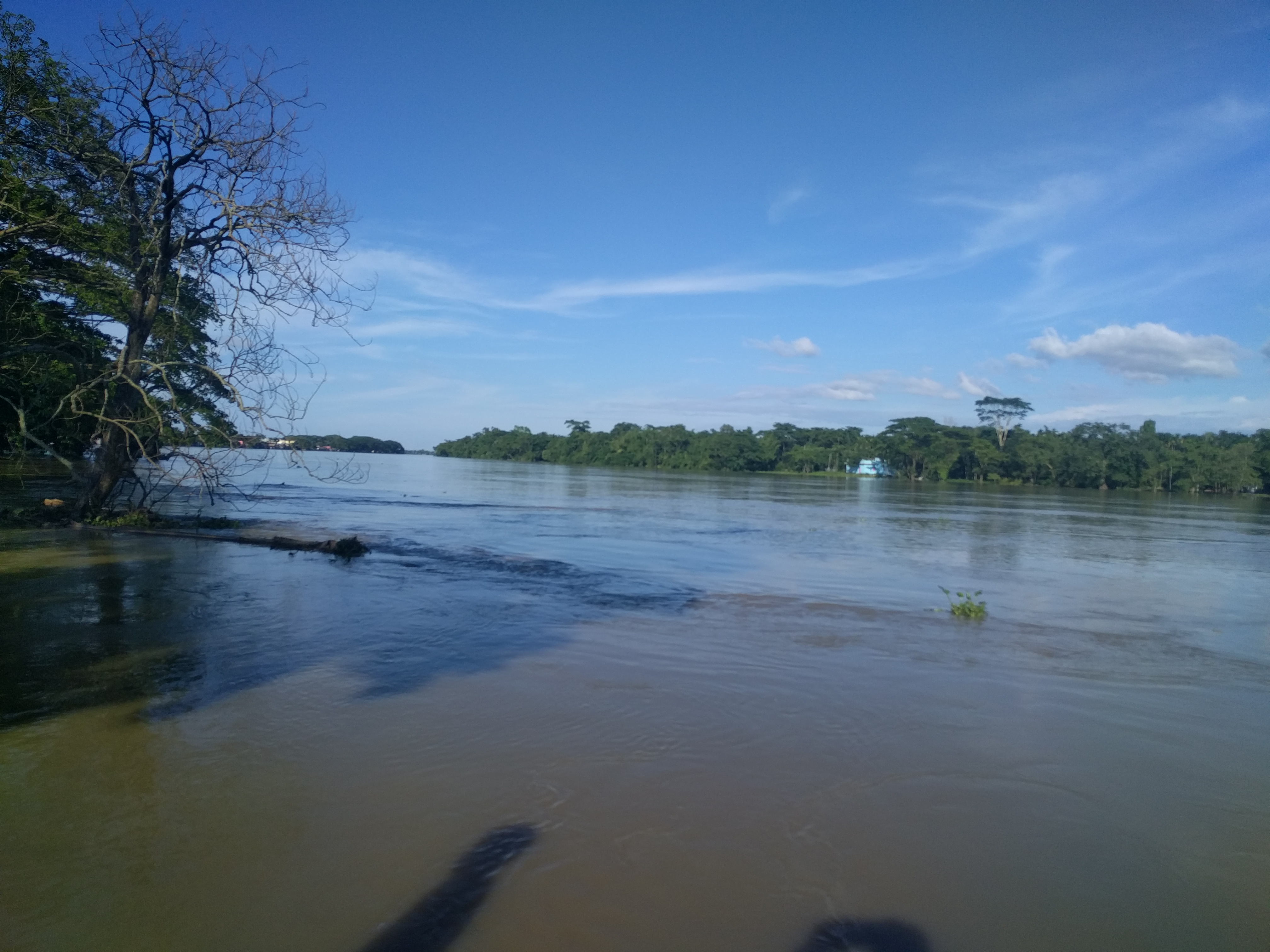 কুশিয়ারা নদী, বালাগঞ্জ, সিলেট